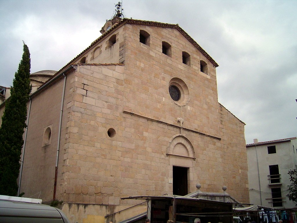 Esglèsia de Santa Coloma de Farners, a La Selva (Catalunya).